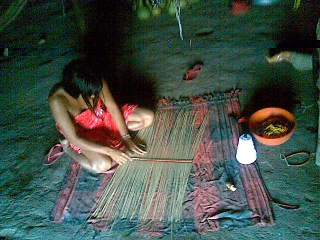 Xingu, indigenous people in Brazil